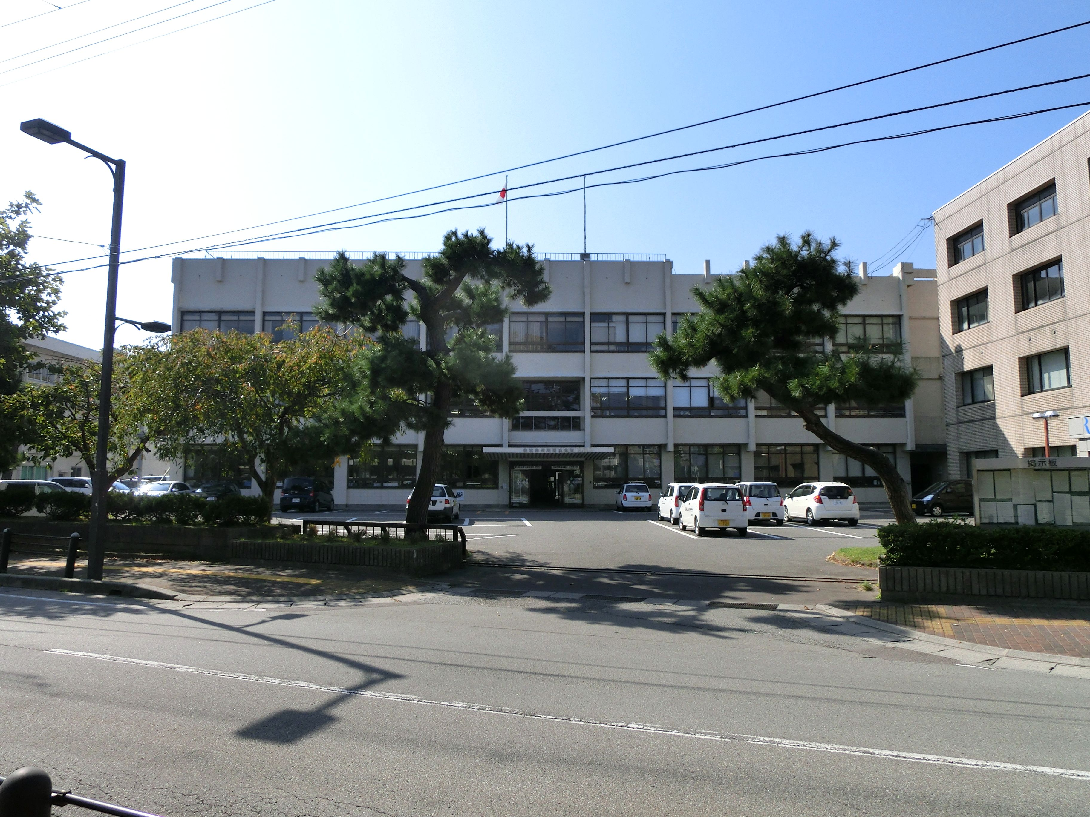 佐渡市役所両津支所